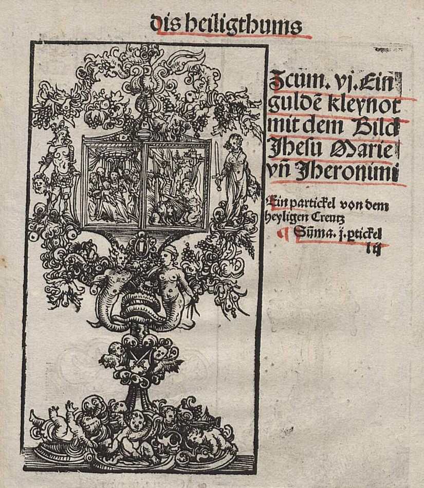 Reliquie mit Stücken vom Kreuz. Woodcut